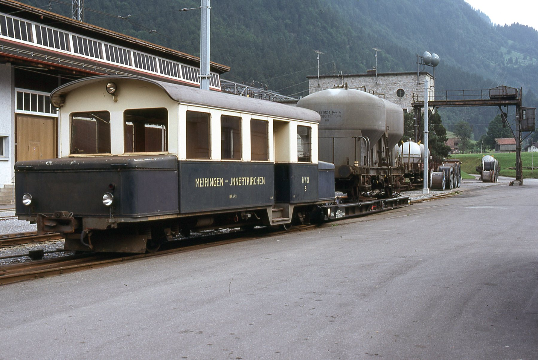 Ce chemin de fer était jusqu'en 1976 non électrifié, ces deux motrices la 4 et la 5 étaient à accumulateurs. La motrice no 5 a été préservée sous un hangard et la no 4 démolie. Après 1976, la ligne a été électrifiée et c'est deux anciens trams allemand qui ont circulés sur cette ligne.